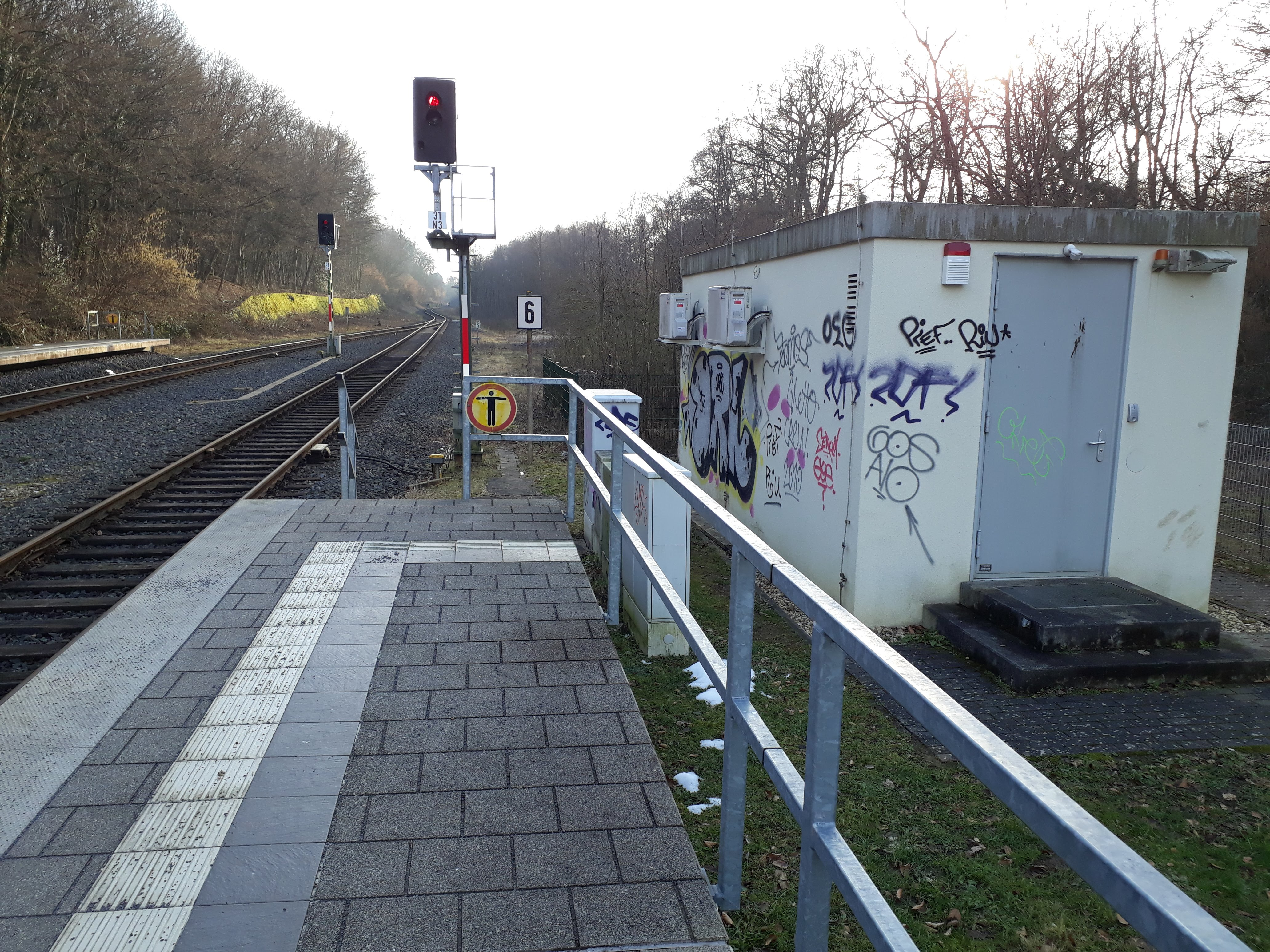 Bahnhof Alfter-Witterschlick: Blick vom Bahnsteig Richtung Kottenforst. Rechts das ESTW-D, links die Stützwand.